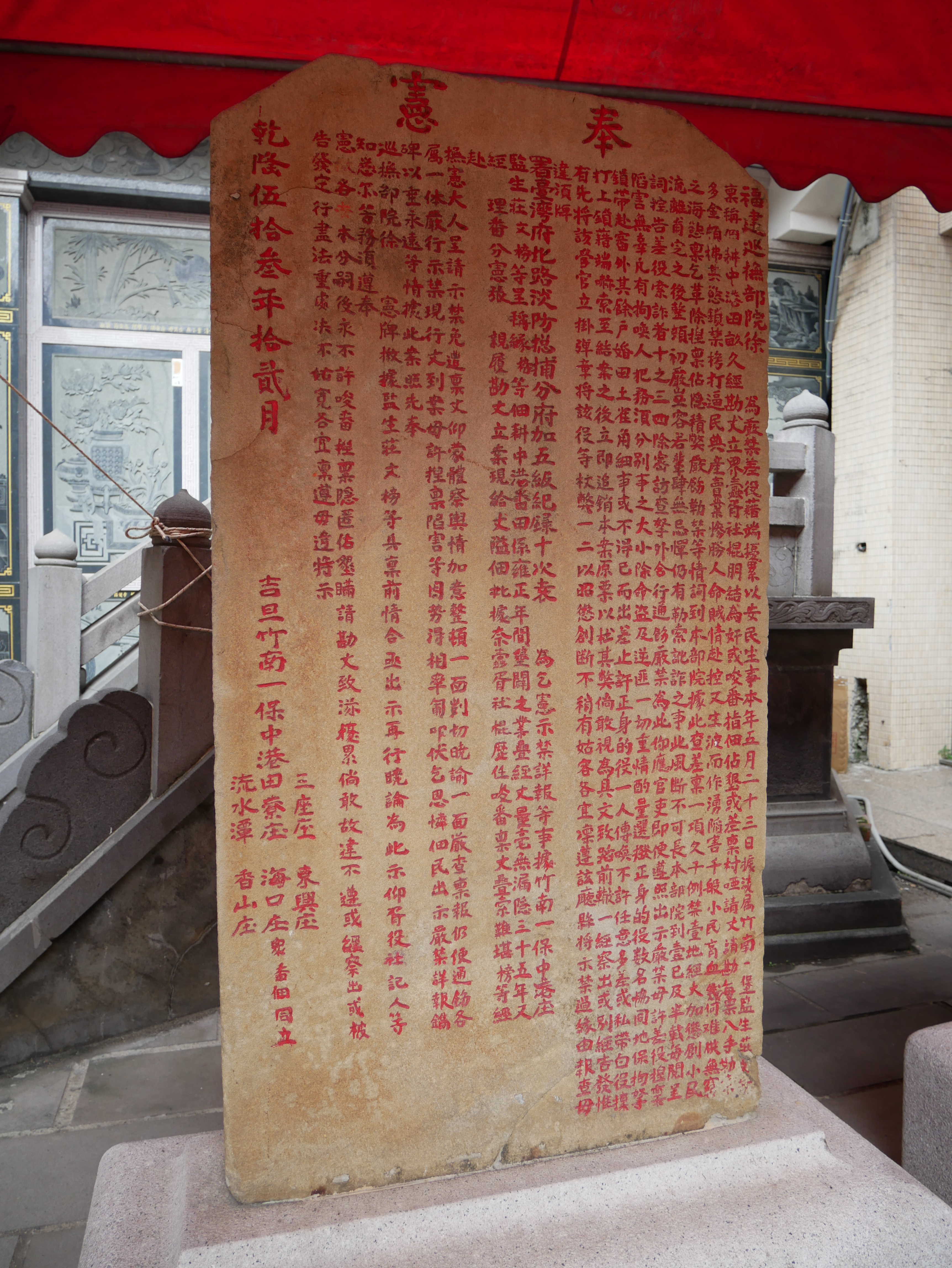 中文（台灣）: 嚴禁差役藉端擾累碑記（乾隆伍拾參年拾貳月），苗栗縣竹南鎮中美里